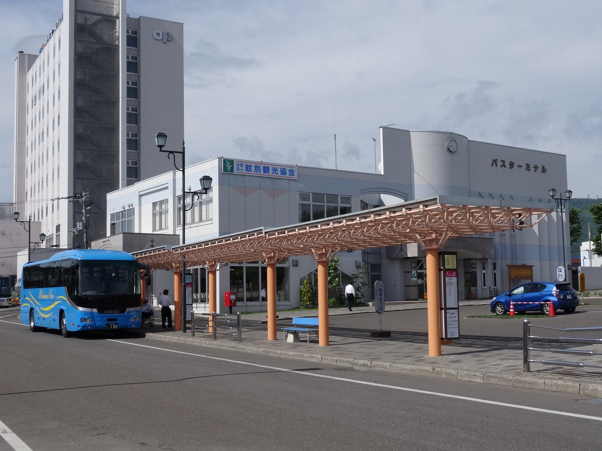 Monbetsu bus terminal